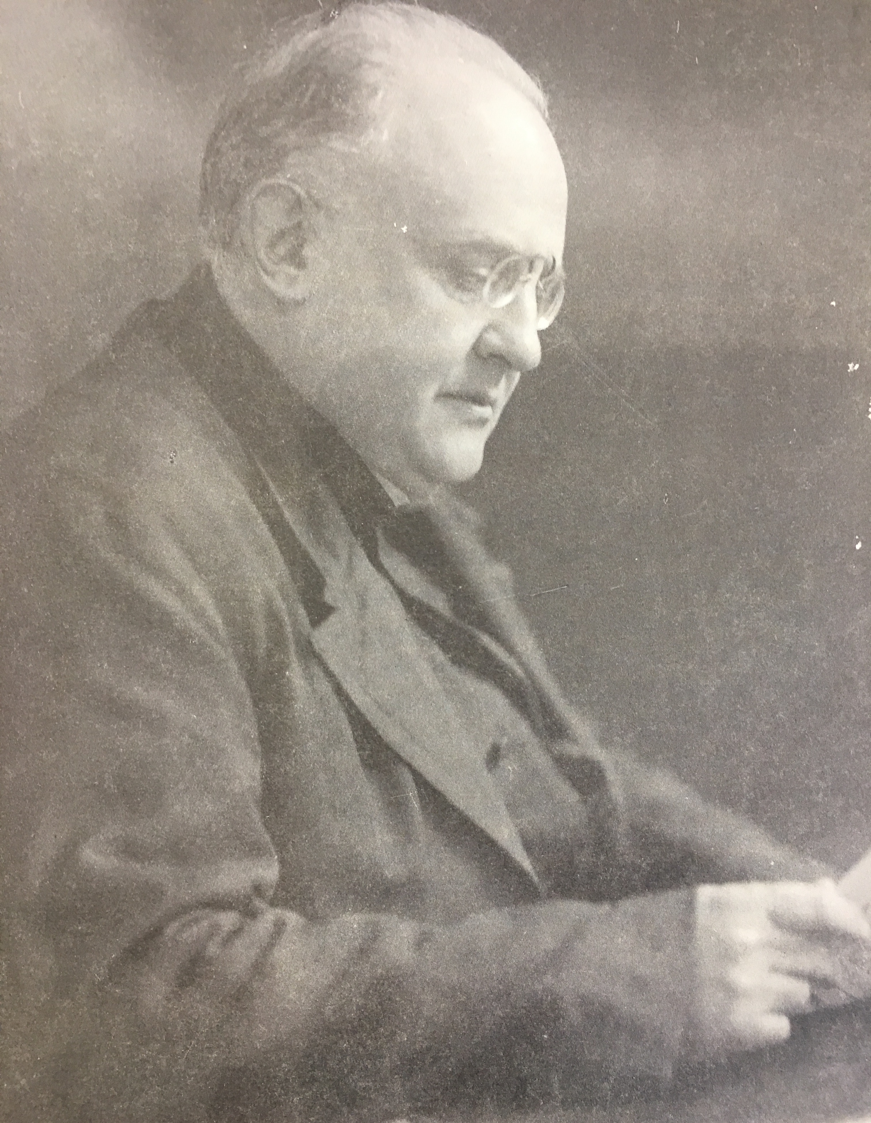 Ermenegildo Pistelli